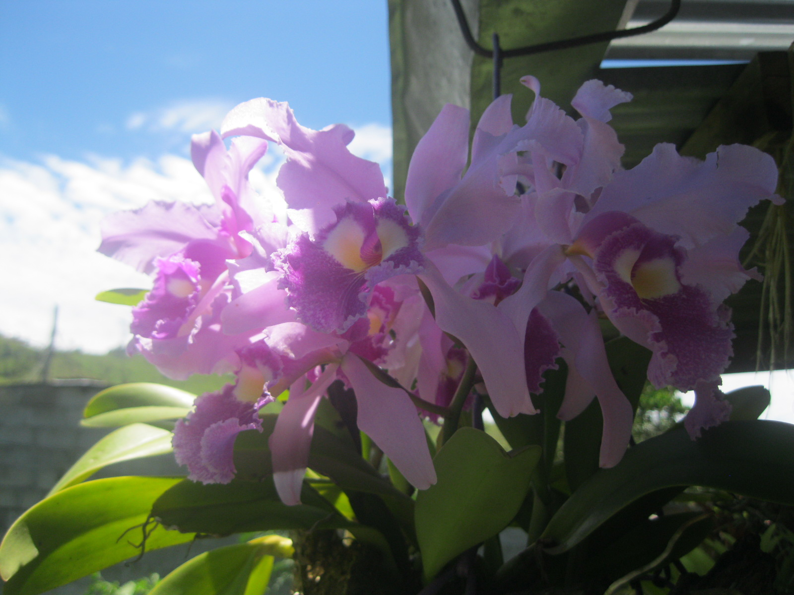 La Orquídea es la flor Nacional de Colombia, denominada como tal en 1936 por la Academia Colombiana de Historia. Es una de las grandes riquezas de Colombia, conocida y apreciada por el mundo entero, especialmente la variedad denominada Cattleya Trianae. Lleva este nombre en honor del naturalista colombiano José Jerónimo Triana. Proviene de la planta espífita de hojas carnosas, de la familia de las orquidáceas. Su estructura y colores son de una belleza extraordinaria. Abundan en los climas templados en las la regiones montañosa cerca de Bogotá y en los departamentos de Antioquia, Caldas, Risaralda, Boyacá, Santander, Huila, Valle, Cauca y Nariño y florecen durante los meses de marzo y abril. En el departamento de Antioquia está ubicado el Parque nacional de la orquídea. Es un privilegio especial para el cultivo de orquídeas, ya que muchas de ellas crecen de manera silvestre en diversas regiones del suroeste antioqueño. Las orquídeas colombianas son " únicas" y las más hermosas del mundo.